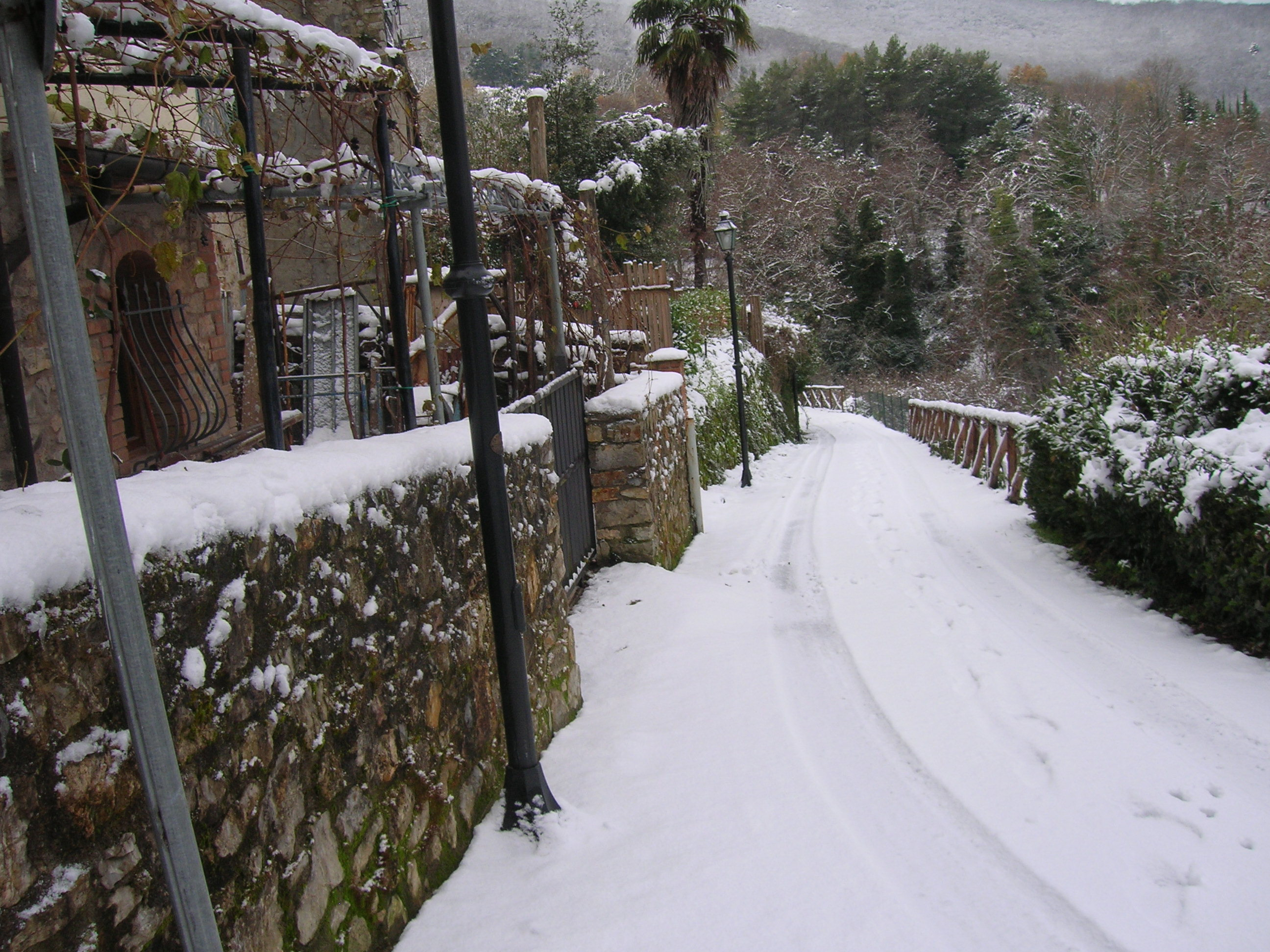 Esterno borgo di Sasso Pisano.